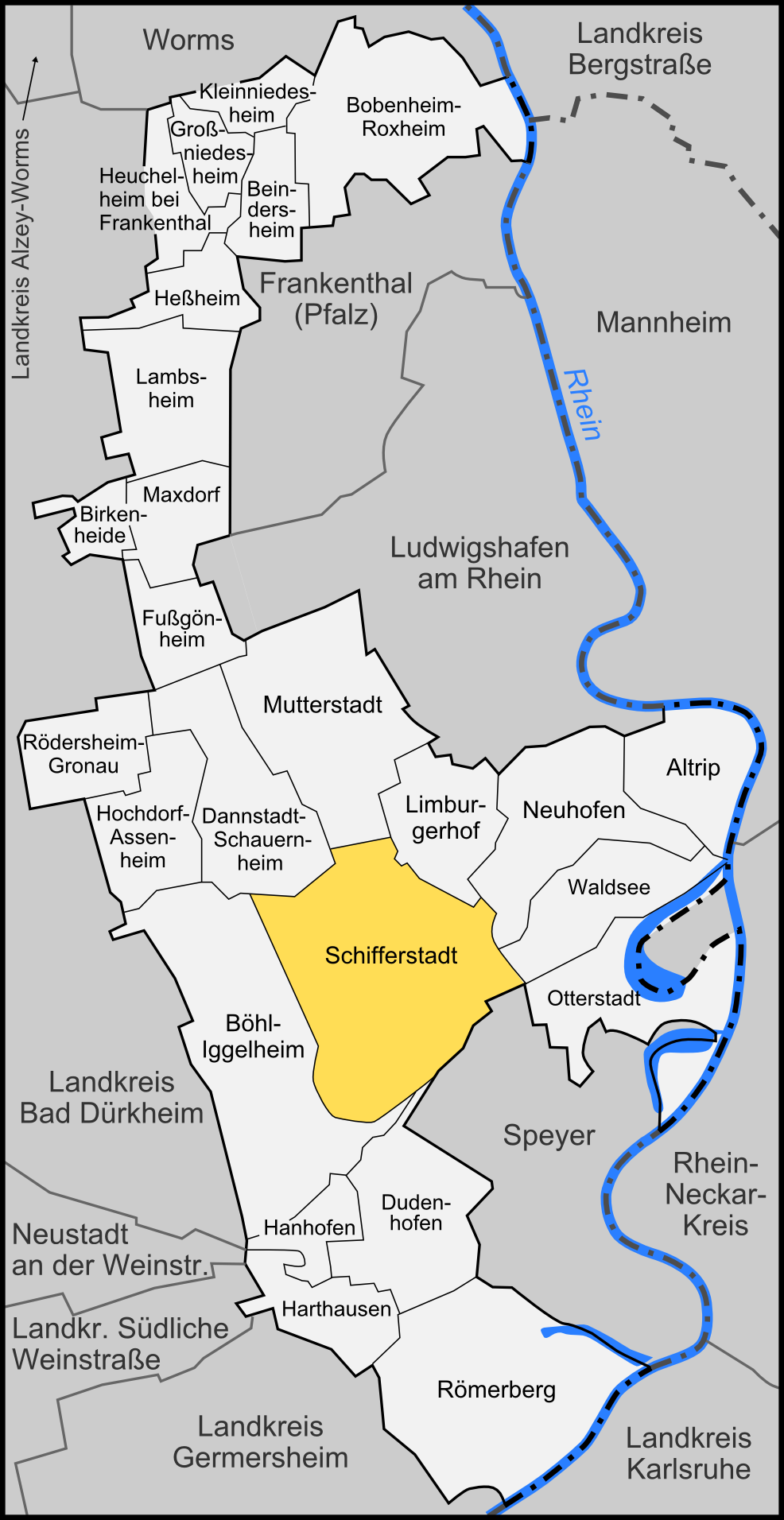 Karte der Stadt Schifferstadt im Rhein-Pfalz-Kreis